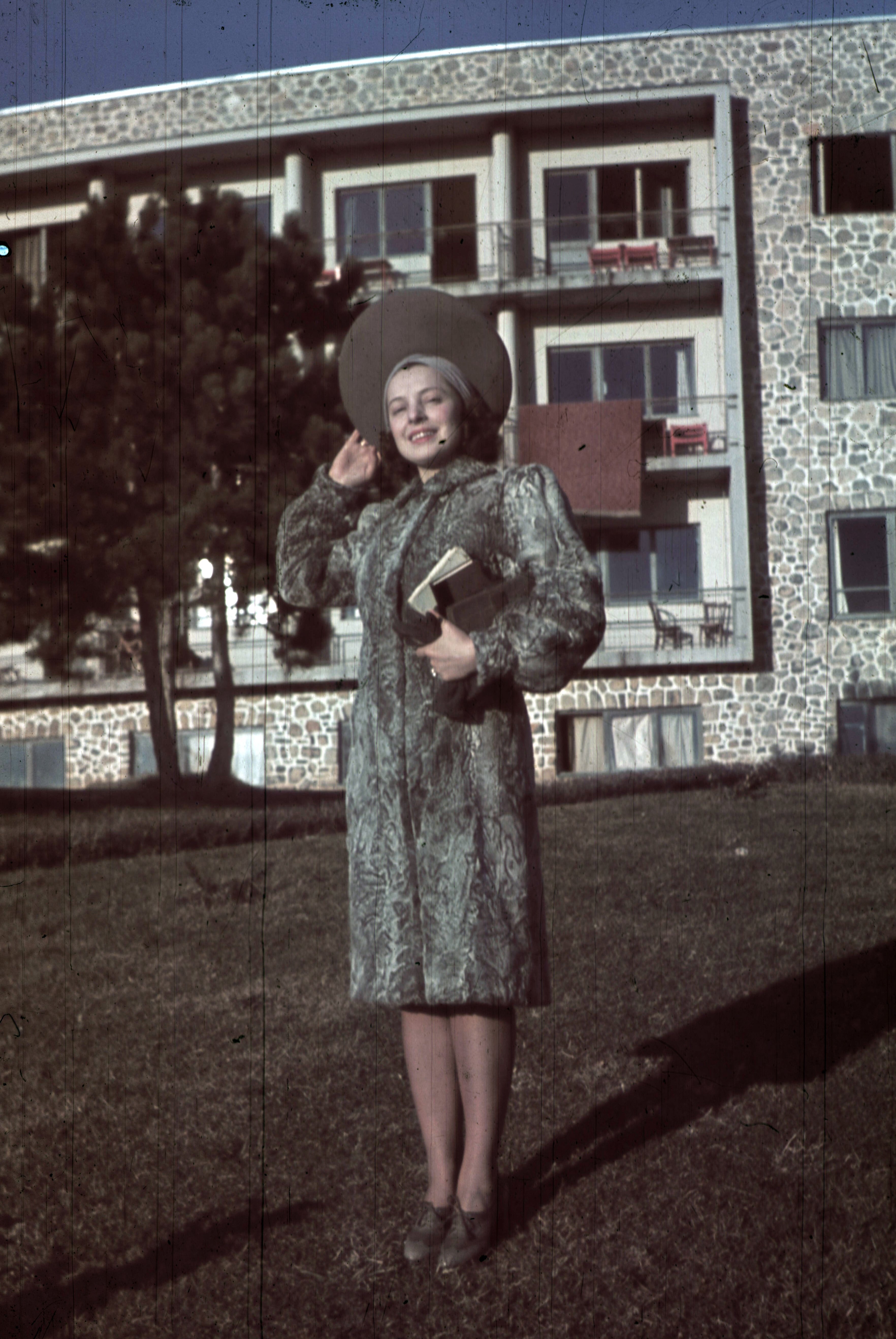 Bordy Bella a pécsi Hotel Kikelet épülete előtt